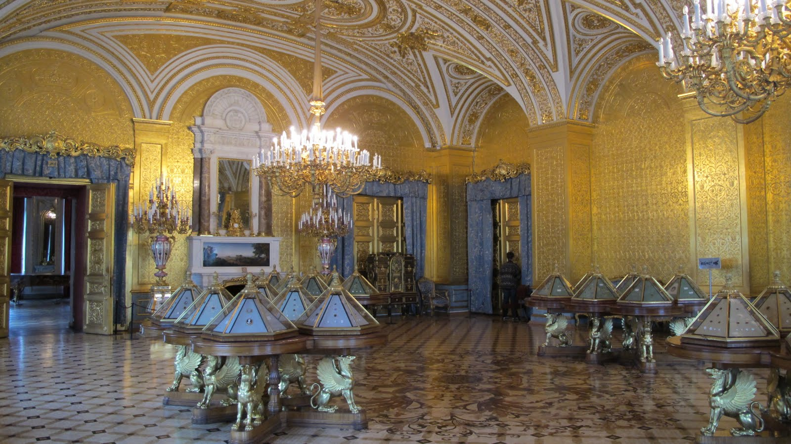 Vasileostrovsky District, St Petersburg, Russia